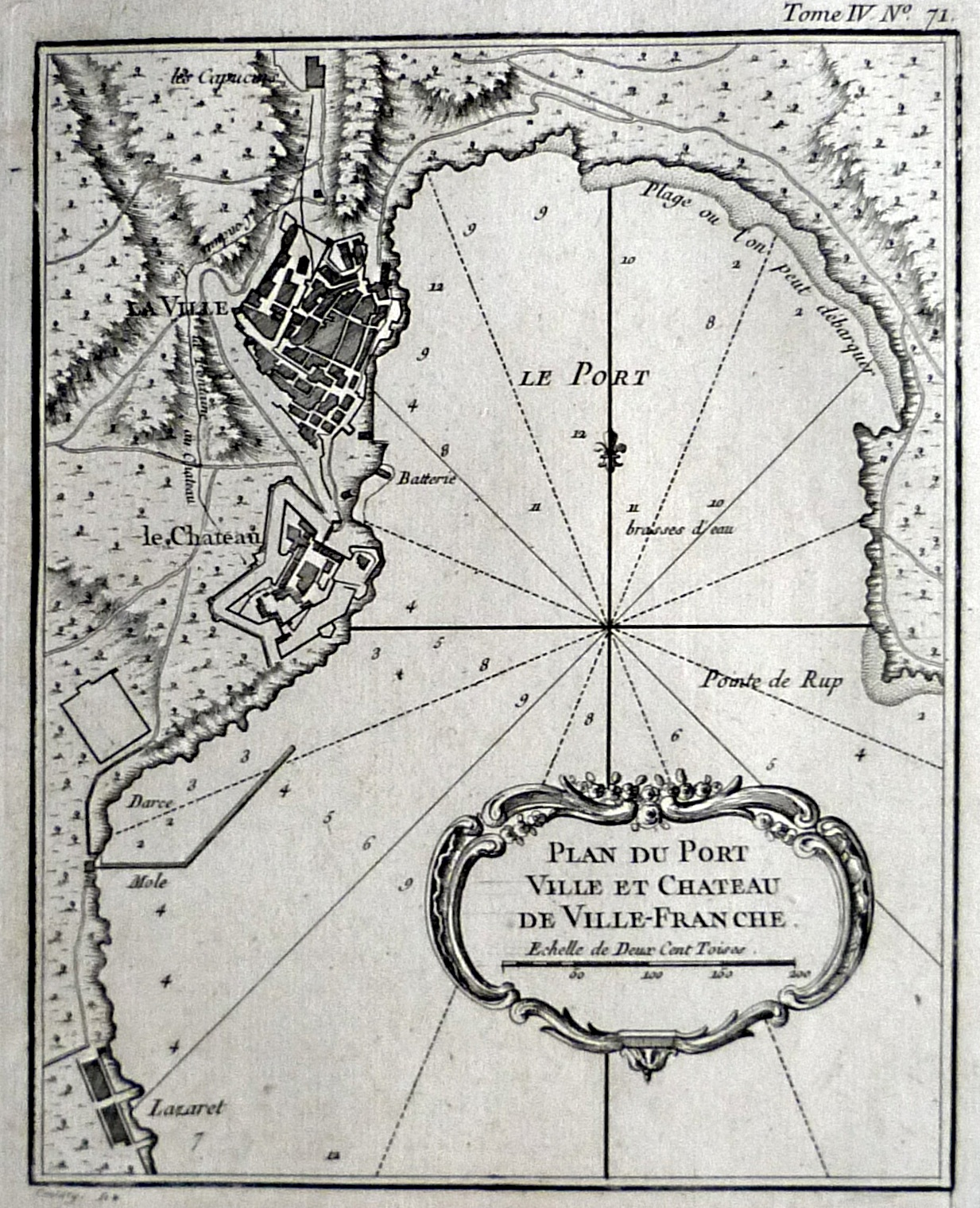 "Plan du Port, Ville et Château de Ville-franche" extraite du "Petit Atlas Maritime" (tome IV) de Jacques Nicolas BELLIN, 1764